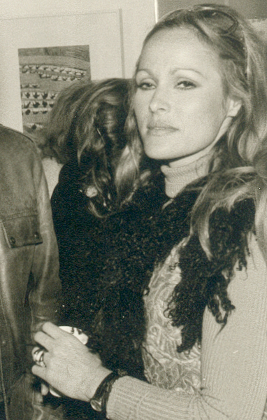 Ursula Andress y Vicenç Caraltó